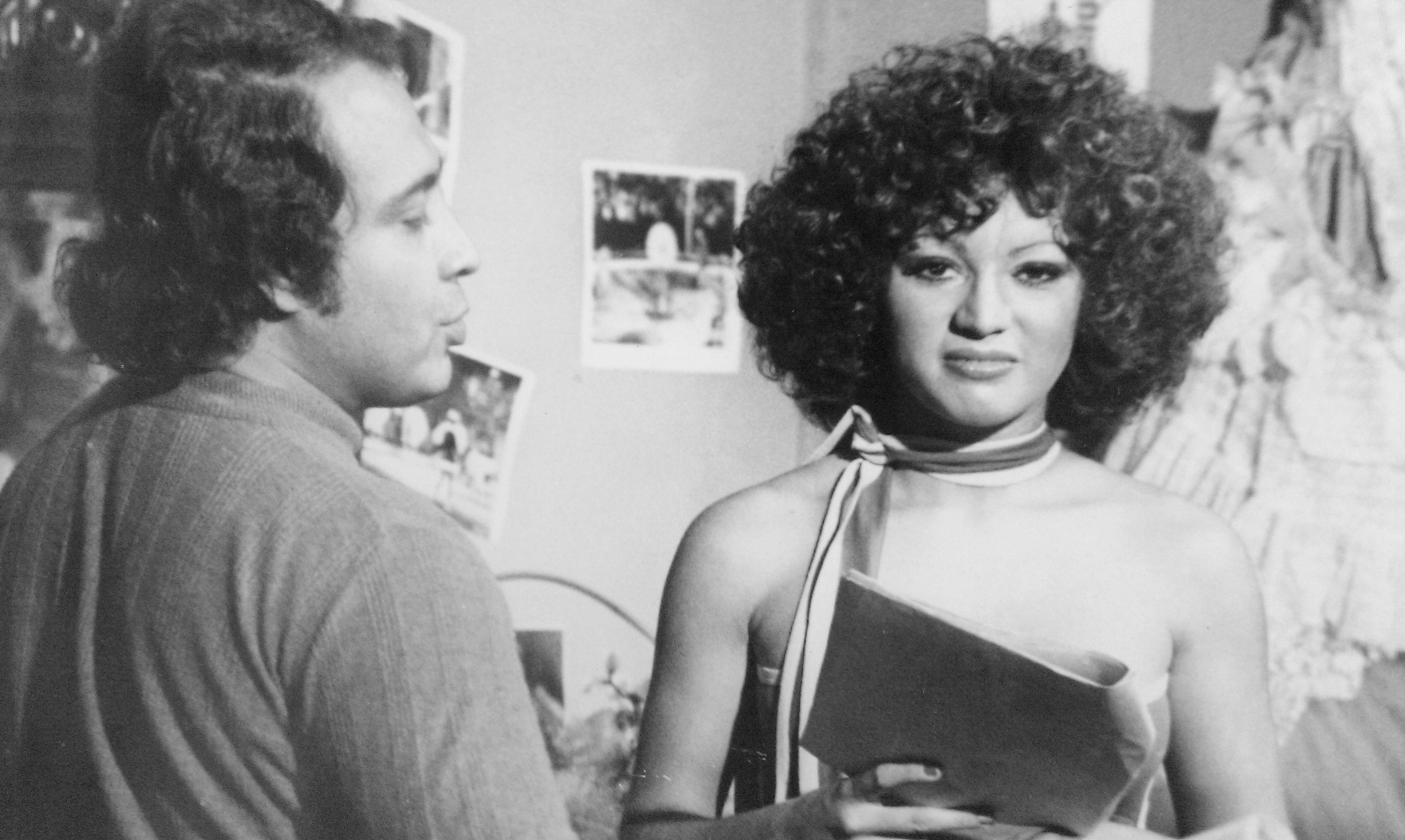 Foto de Iris Chacón y Gilberto Varela en 1976.